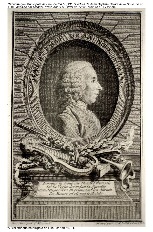 dessin de Monnet, gravure de C.A. Littret en 1763